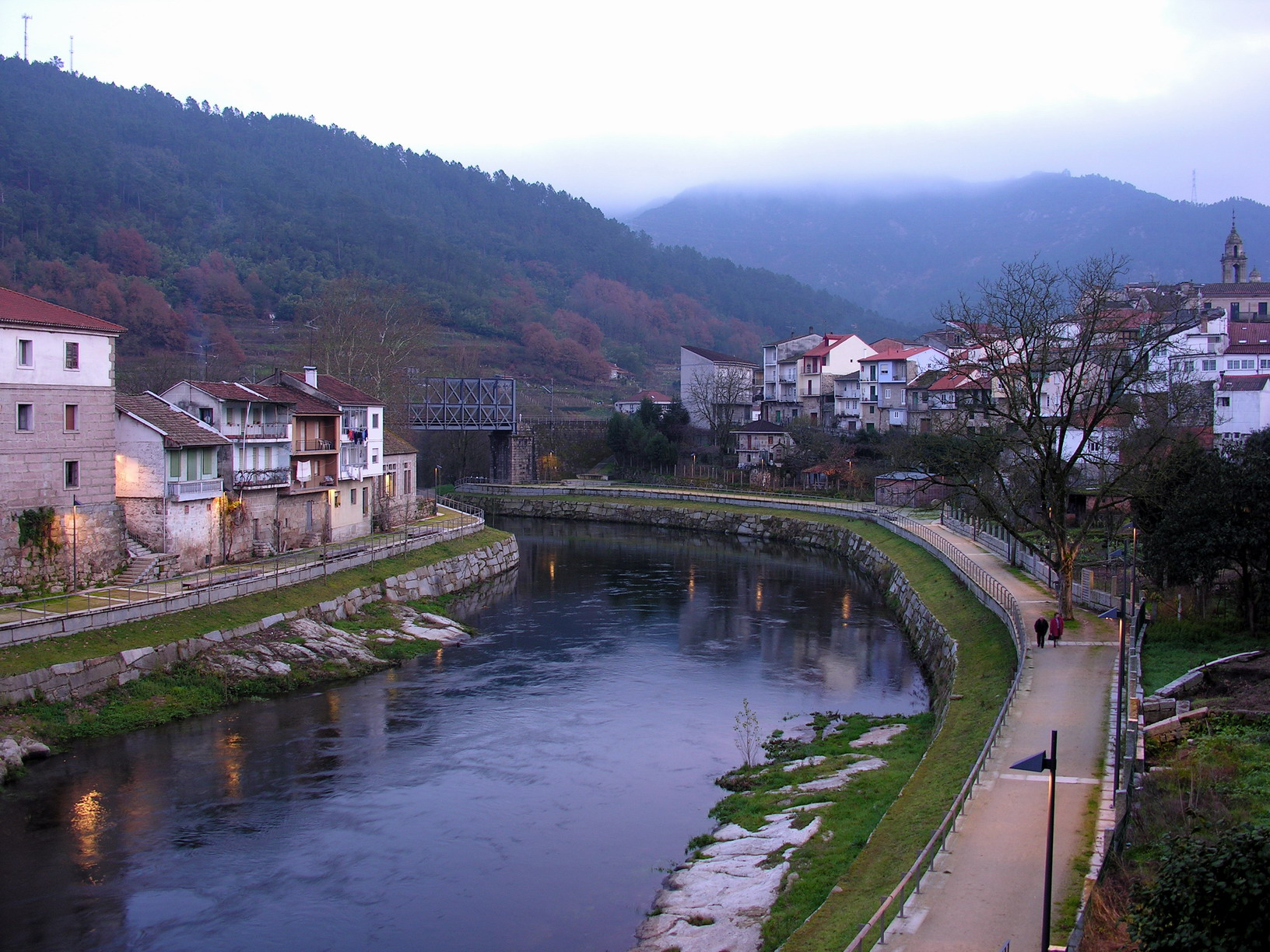 self made. Ribadavia - Galicia - Spain Río Avia anoitecendo en Ribadavia